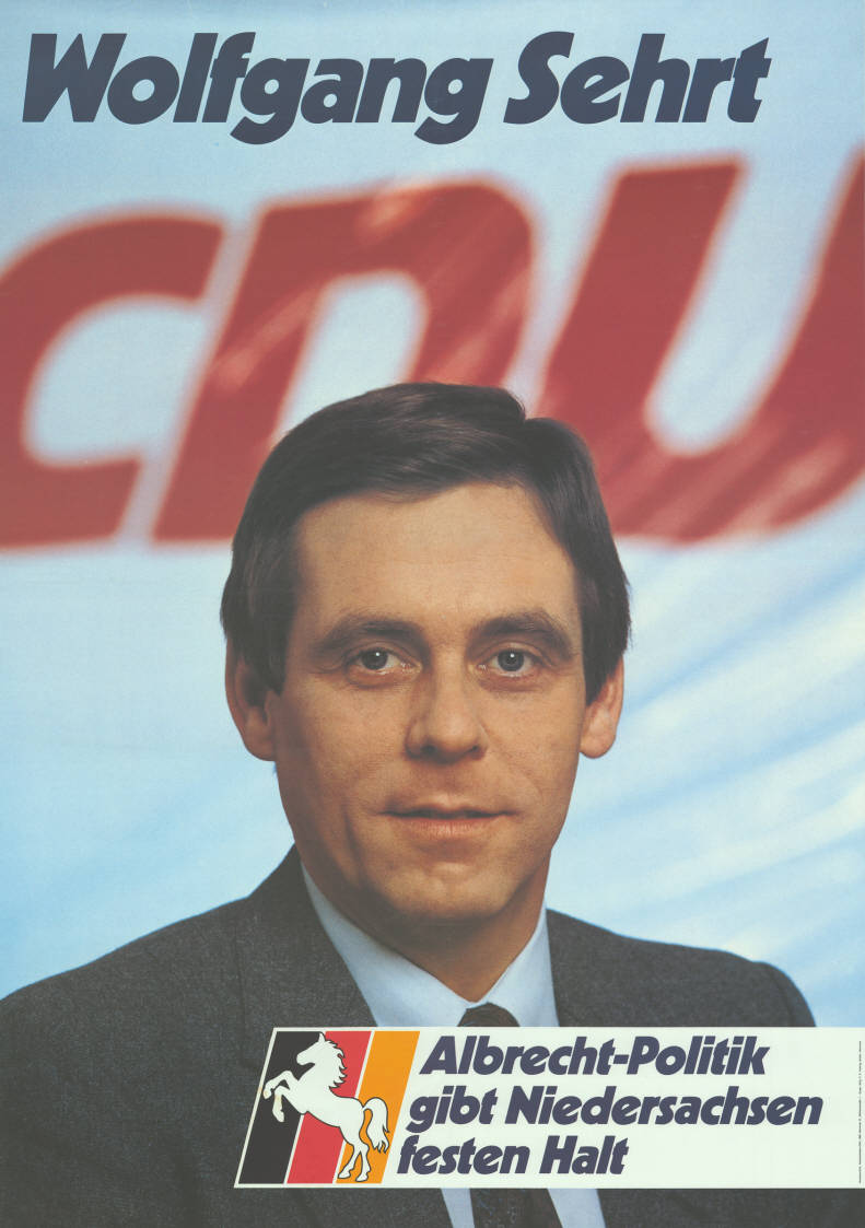 Wolfgang Sehrt CDU Albrecht-Politik gibt Niedersachsen festen Halt Abbildung: Porträtfoto - Nationalfarben mit Niedersachsenross Plakatart: Kandidaten-/Personenplakat mit Porträt Auftraggeber: Verantw.: Niedersachsen-CDU, Hannover Drucker_Druckart_Druckort: Willy F.P. Fehling GmbH, Hannover Objekt-Signatur: 10-008 : 491 Bestand: Landtagswahlplakate Niedersachsen (10-008) GliederungBestand10-18: Landtagswahlplakate Niedersachsen (10-008) » CDU Lizenz: KAS/ACDP 10-008 : 491 CC-BY-SA 3.0 DE